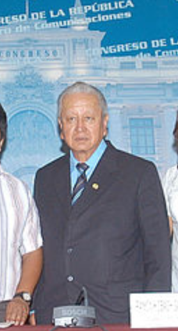 Congresista de la República del Perú Ramón Kobashigawa Kobashigawa.